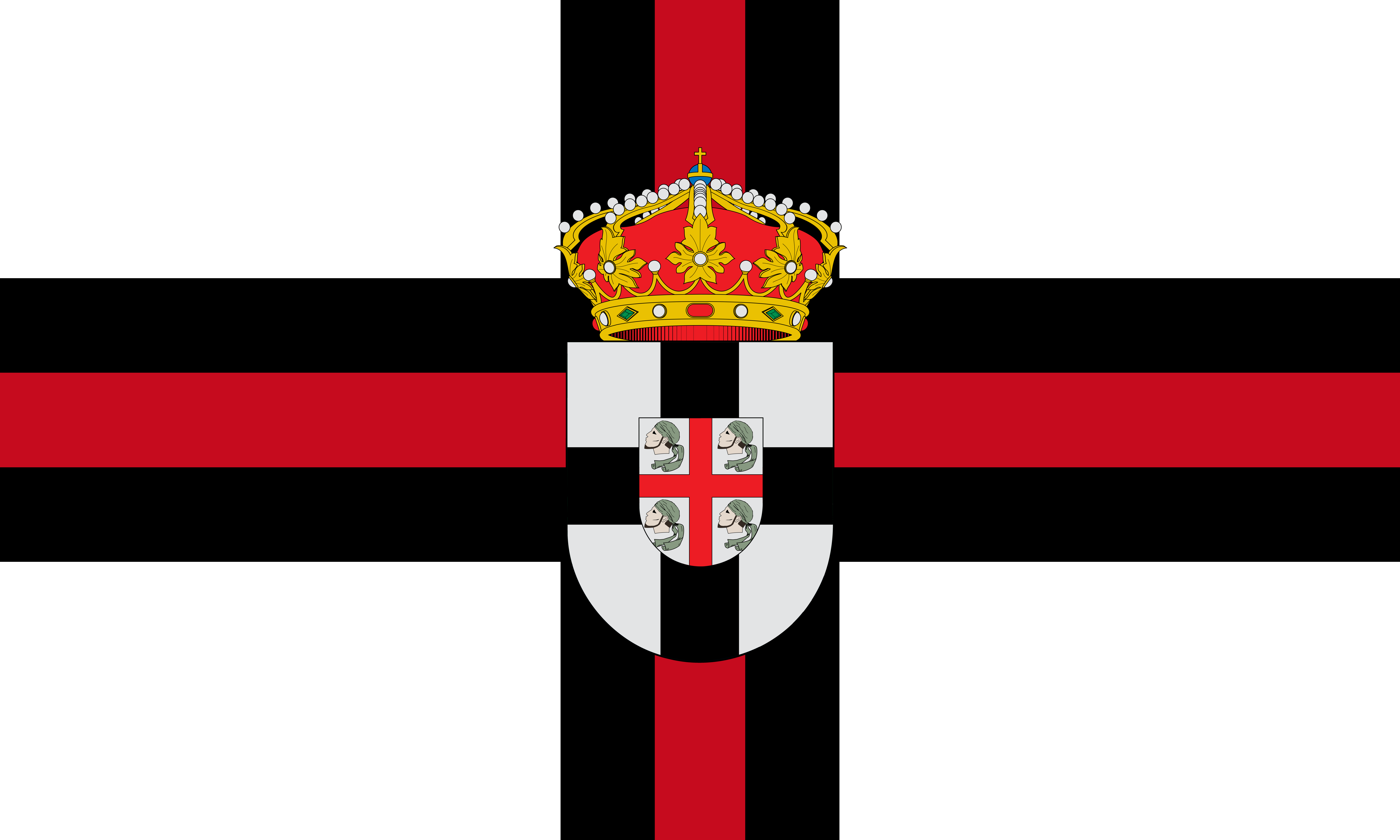 Bandera de Poleñino, Huesca